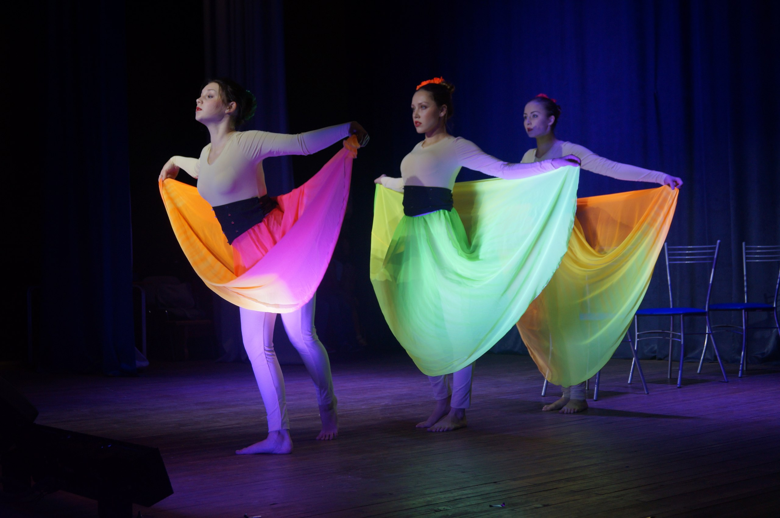 Арт-балет